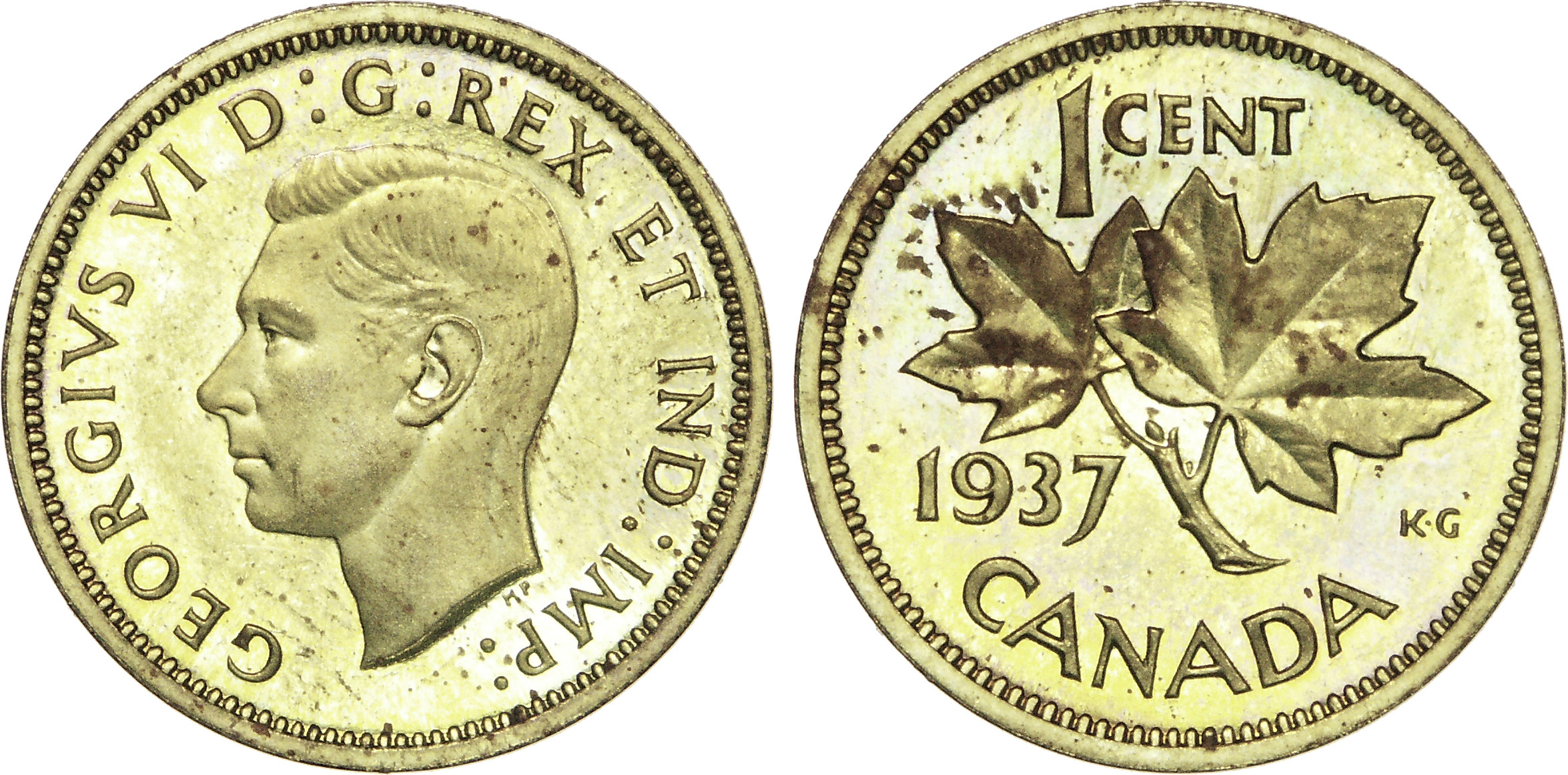 Métal : laiton Diamètre : 19,11mm Axe des coins : 6h. Poids : 3,12g. Tranche : lisse Titulature avers : GEORGIVS VI D : G : REX ET IND : IMP :. Description avers : Tête de George VI à gauche ; initiales des graveurs sous le buste. Titulature revers : CANADA / 1937 / K.G / 1 CENT. Description revers : Rameau d’érable.